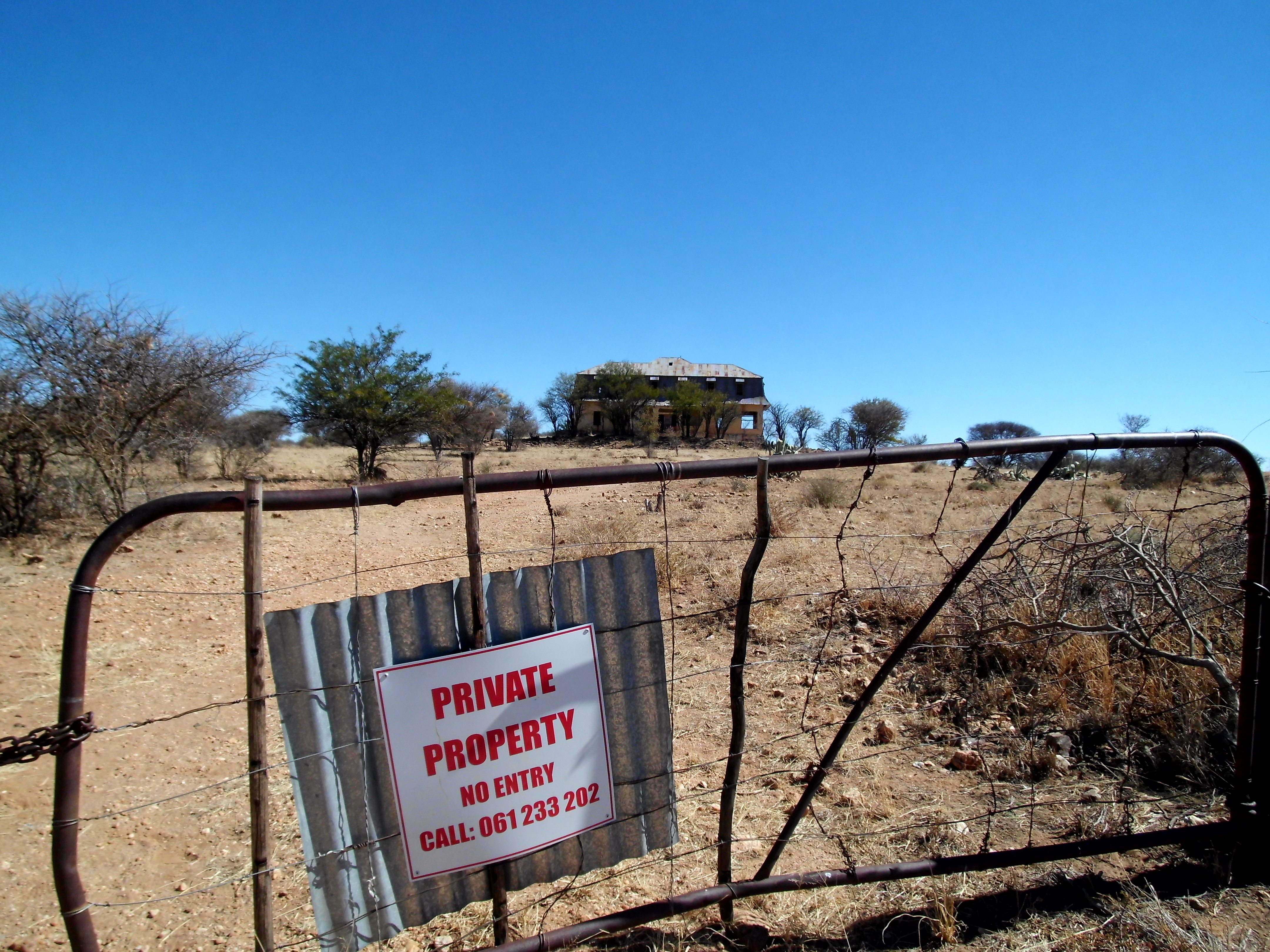 Das Liebig-Haus bei Neuuheusis in Namibia